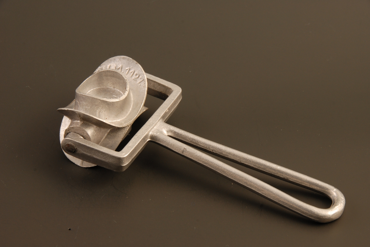 Trinse for å stanse ut smultringer